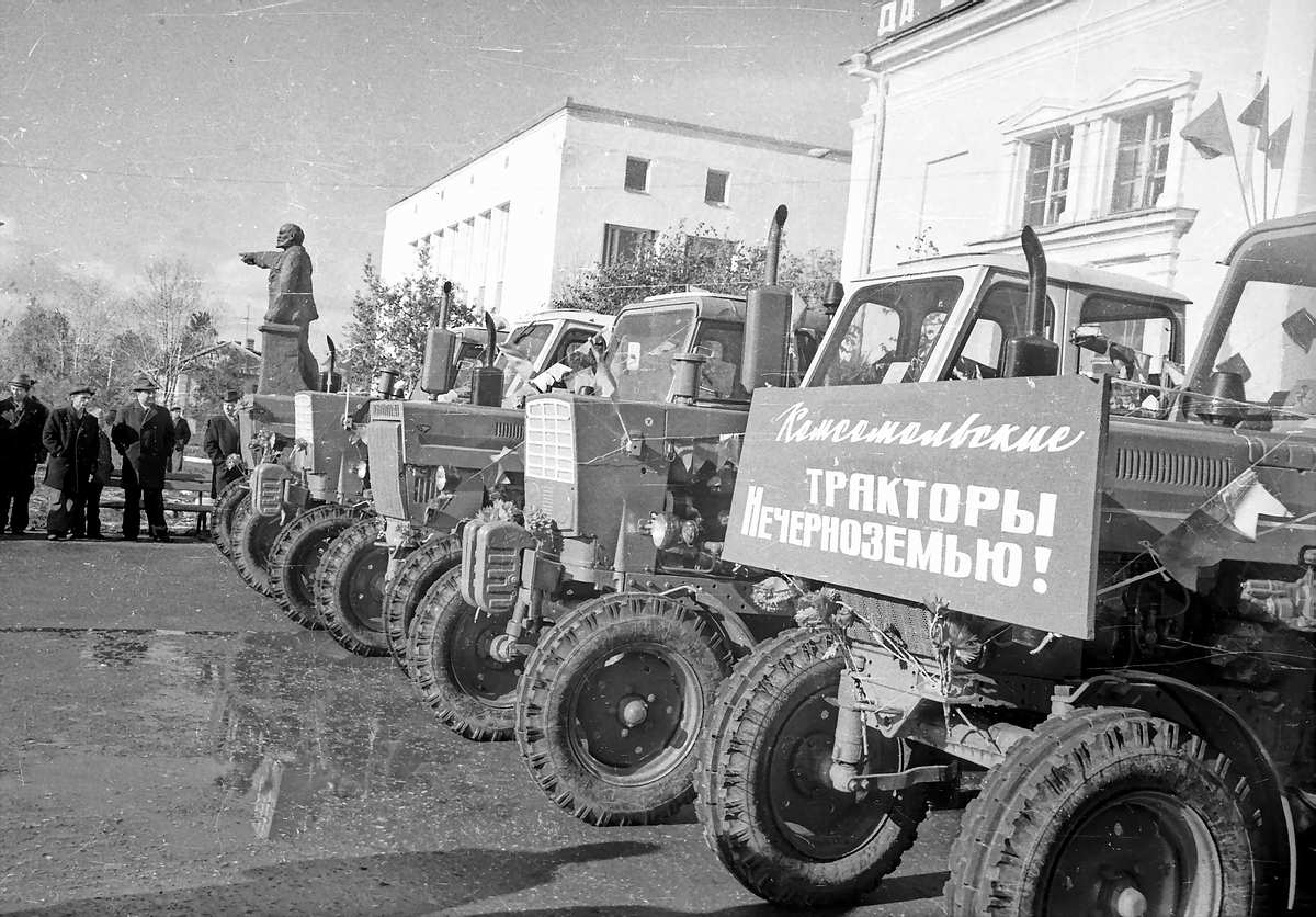 Идёт слёт ученических трудовых объединений. На Народной площади лучшие механизаторы Переславского района получают трактора МТЗ-50, изготовленные из металлолома, собранного школьниками. Пять красавцев «Беларусей» в цветах и ярких лентах стоят перед Домом культуры Переславского химического завода. На каждой кабине надпись «Переславский комсомолец». Эти могучие машины получат механизаторы М. Е. Иванов из совхоза имени Ленина, Н. А. Волков из совхоза «Борьба», Николай Петренкин из совхоза «Бектышево», Владимир Пупков из колхоза «Красная заря», Сергей Коновалов из совхоза «Нагорье». Переславль-Залесский, Народная площадь. (Переславский музей-заповедник, отдел истории советского общества, конверт 1028.)